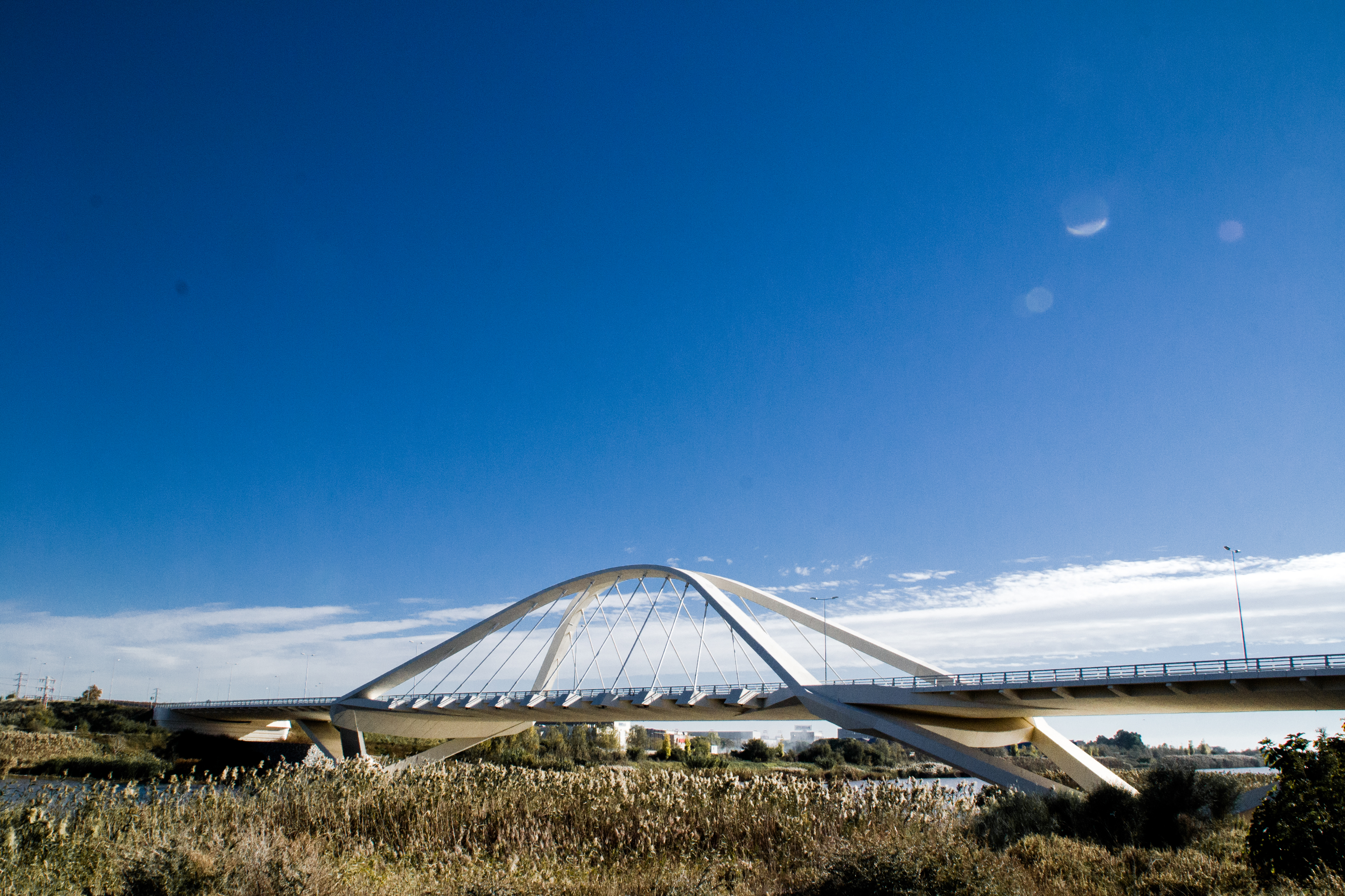 Vista del Puente Nelson Mandela en El Prat de Llobregat.